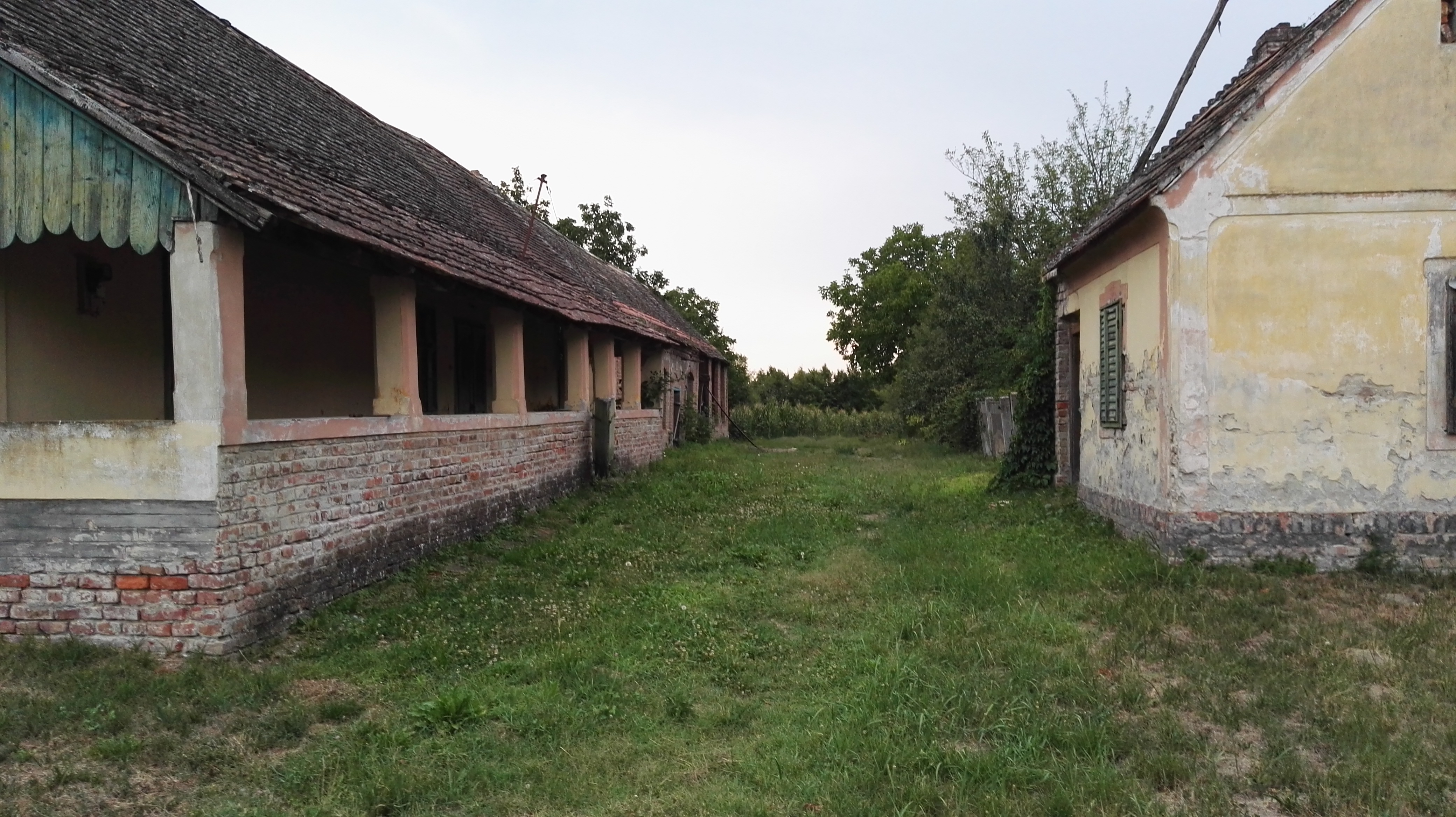 Српски (ћирилица): Tótújfalu, régi ház